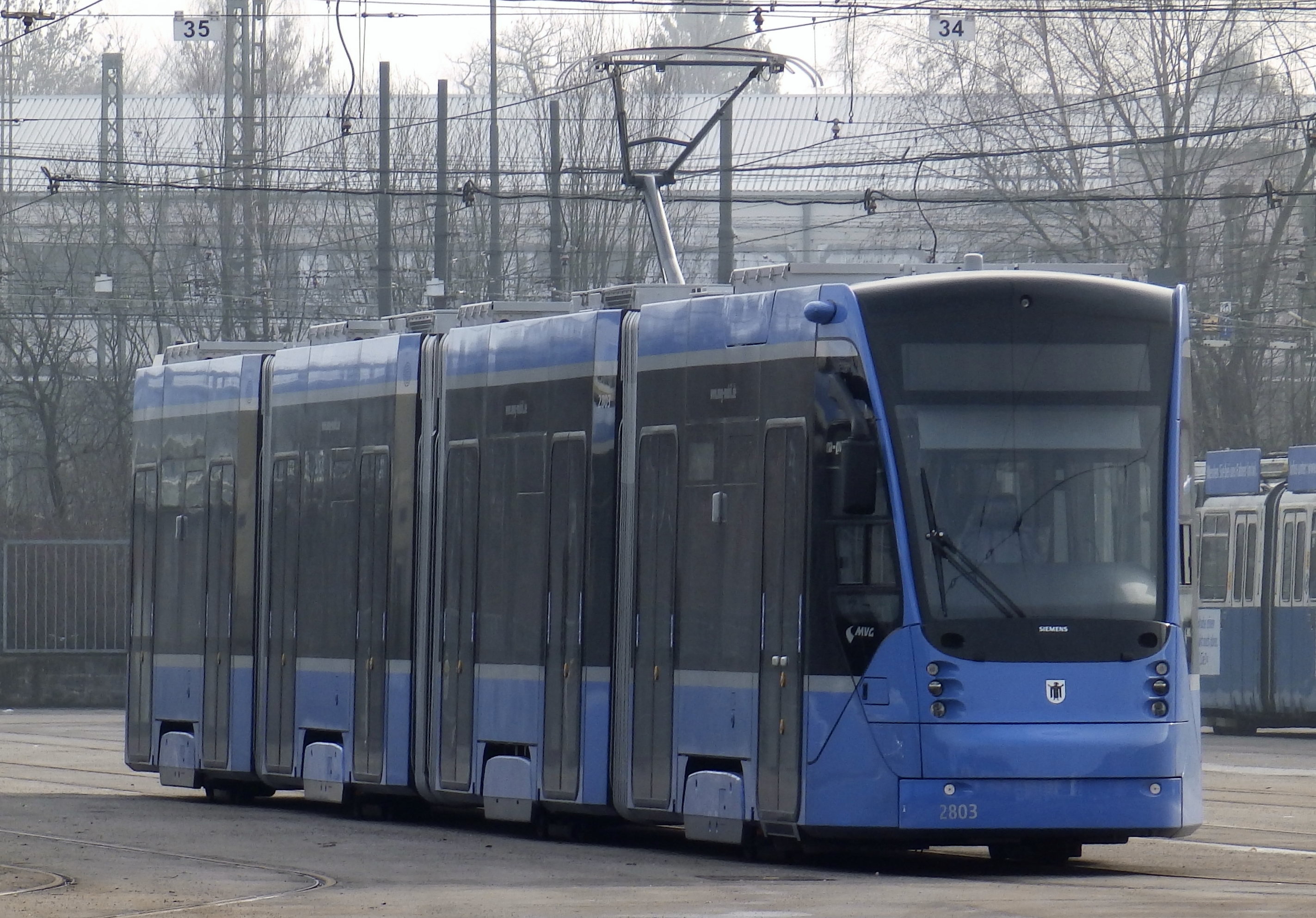 Nachbearbeitetes Bild eines Siemens Avenio in München in der Einsteinstraße im Betriebshof 2